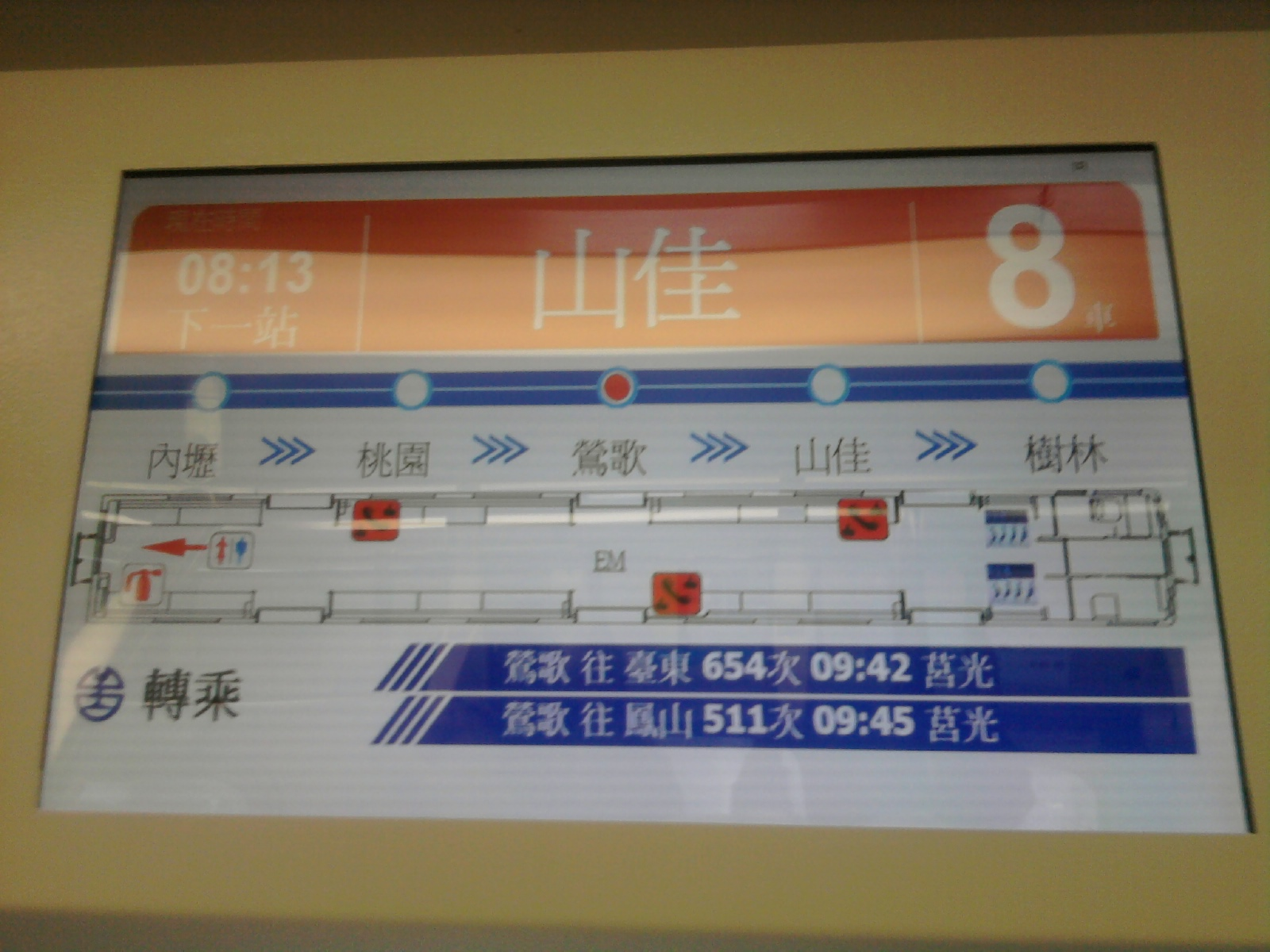 EMU600型資訊顯示器第一版